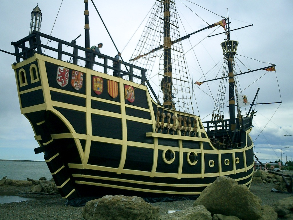 Réplica a tamaño real de la nave de Magallanes